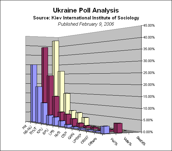 Prospección de resultados para las elecciones al parlamento ucraniano en febrero 2006